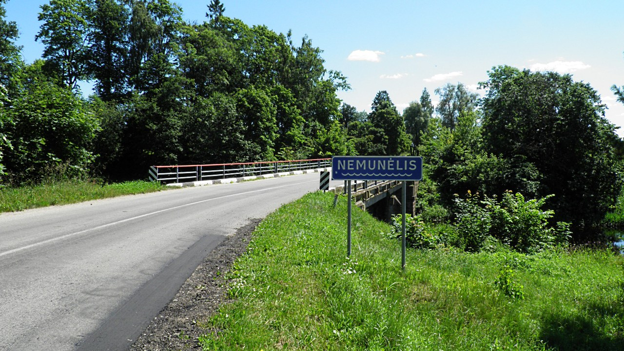 Мост через р. Мемеле (Немунелис)